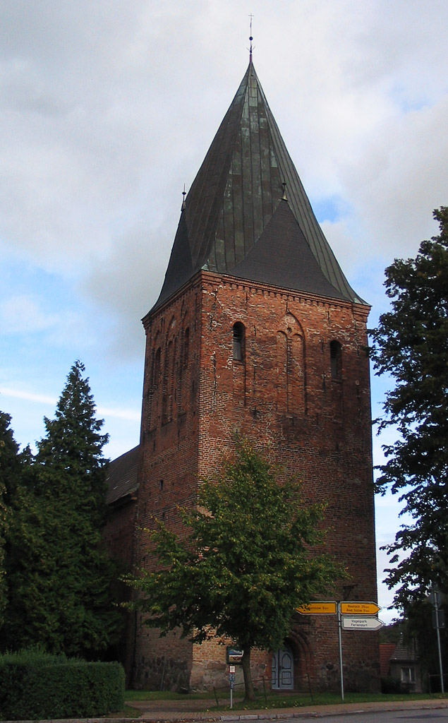 Beschreibung: Kirche von Marlow, Front Fotograf: Darkone, 26. September 2004